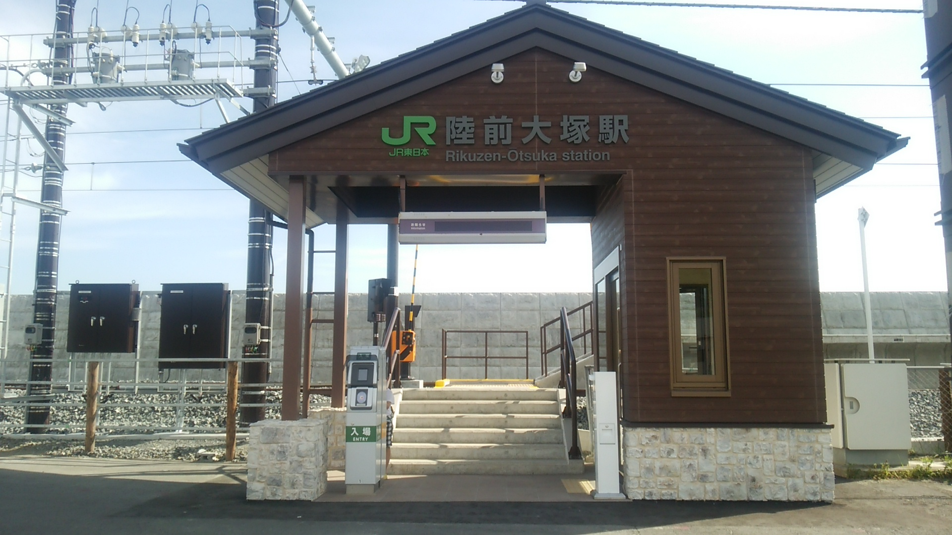 2015年5月30日に撮影した、陸前大塚駅の駅舎です。